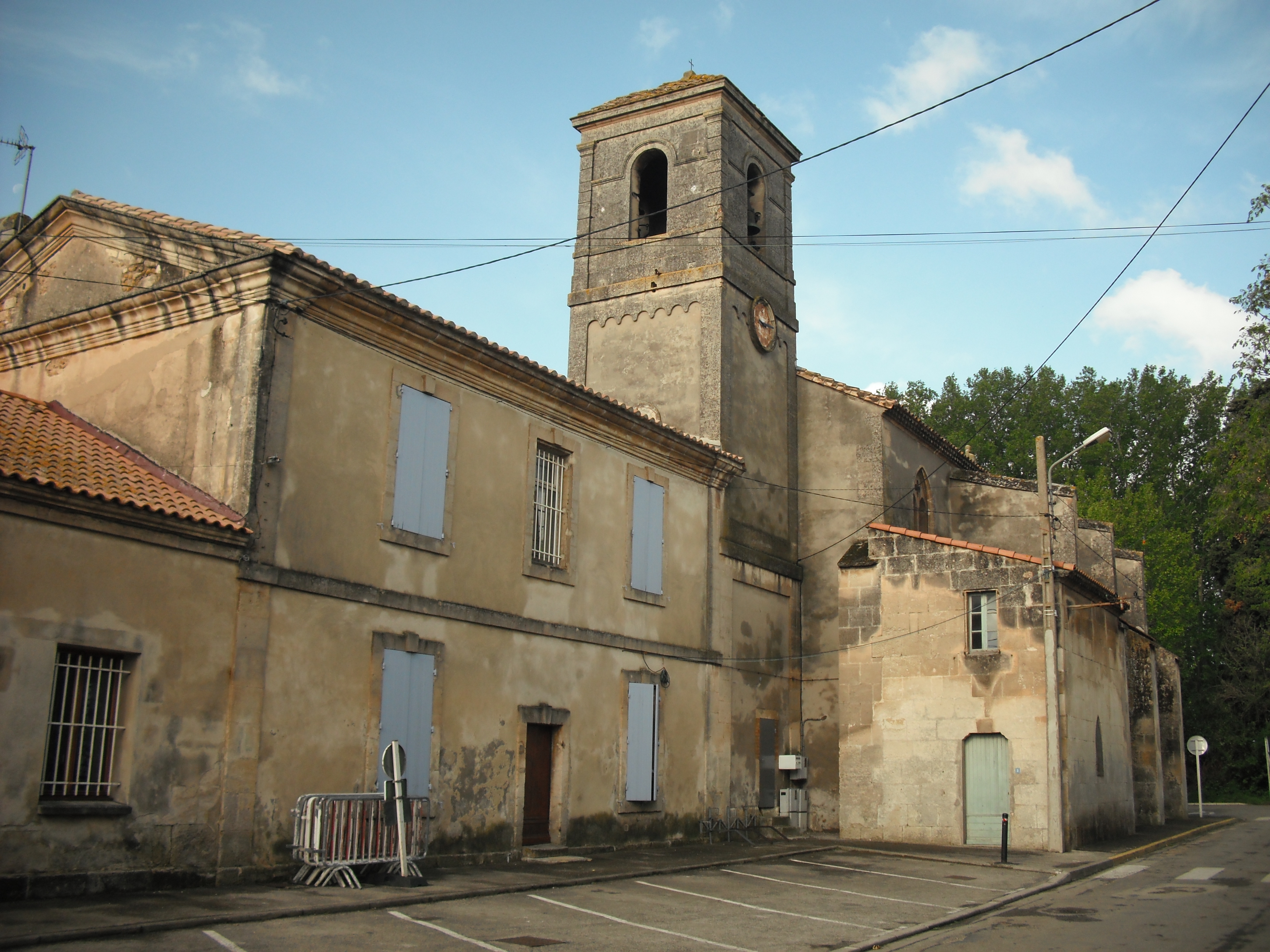 Eglise de Moulès (Arles, 13)